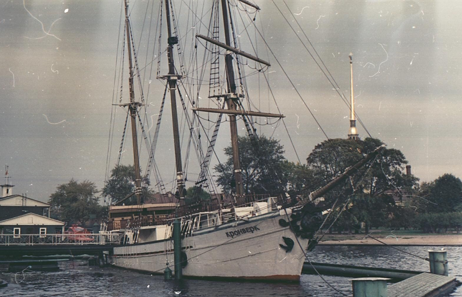 Баркентина Сириус она же ресторан Кронверк, Ленинград 1983 год